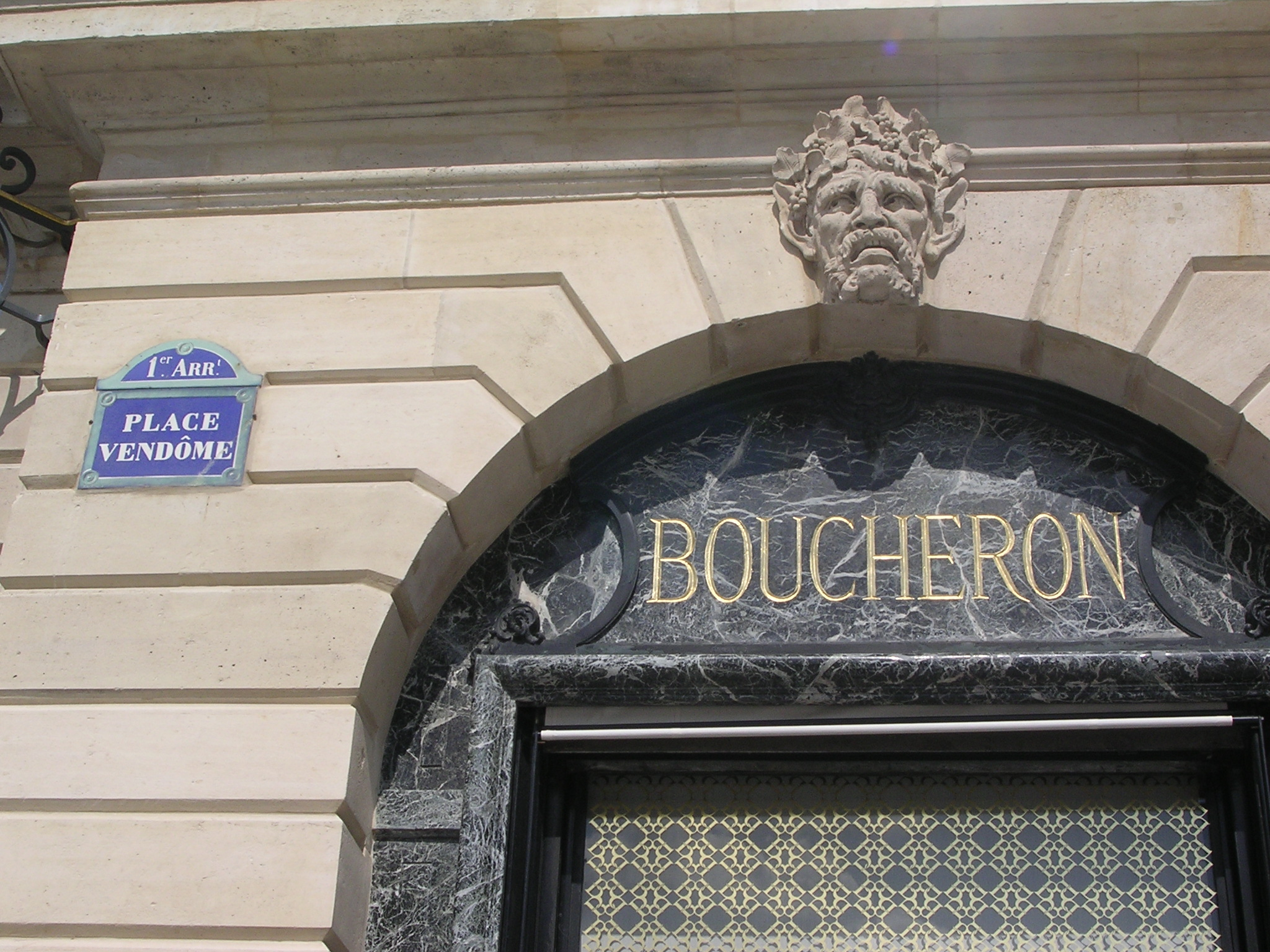 Devanture boutique Boucheron, Place Vendôme